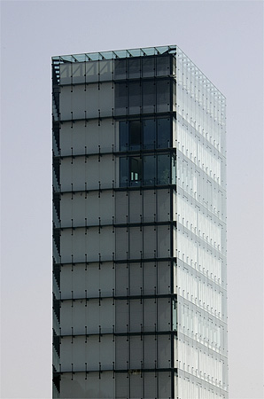 Eidgenössisches statistisches Amt à Neuchâtel